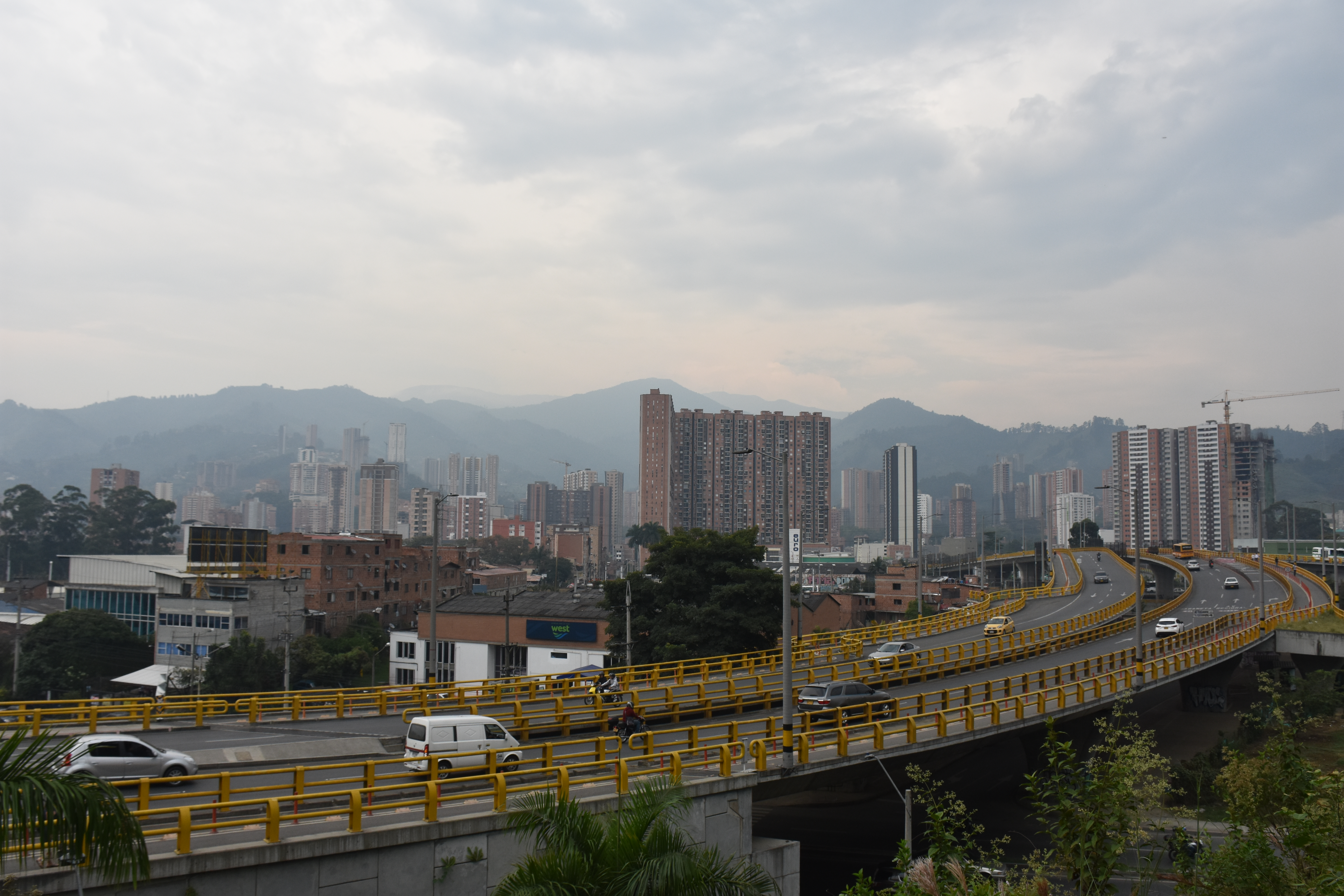 Vista Panorámica de Sabaneta sobre el viaducto Rafael Uribe Uribe